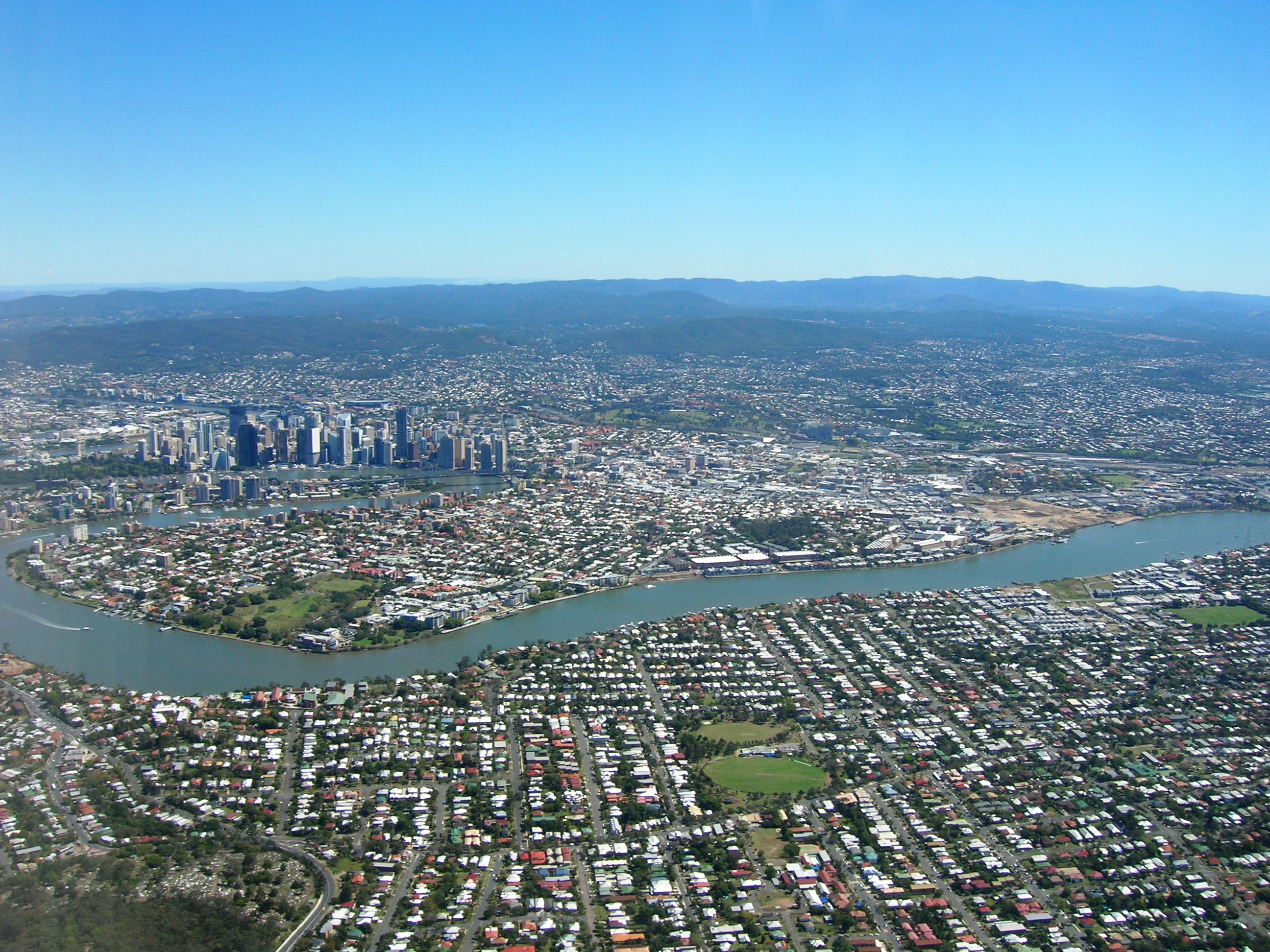 i090806 014